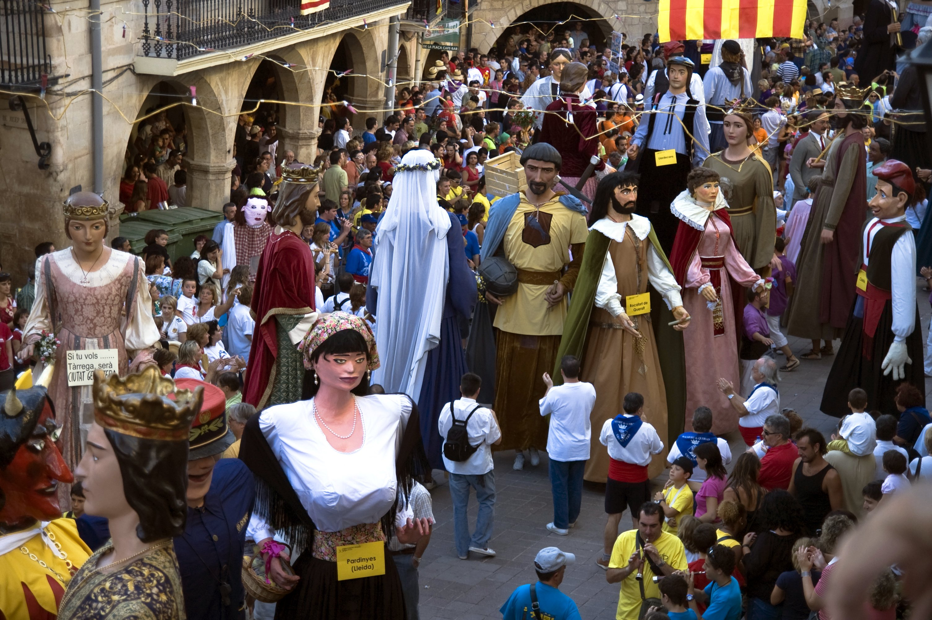 Gegants a la Festa Major de Les Borges Blanques, la capital de la comarca de les Garrigues, (Catalunya).